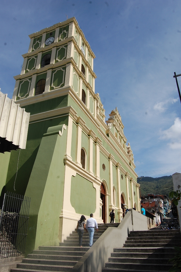 tovar